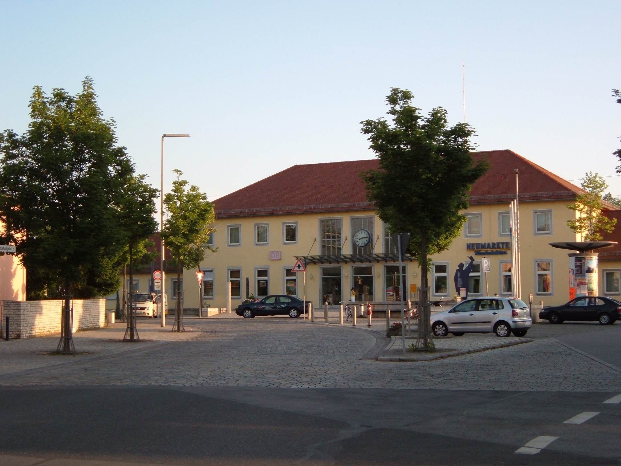 Neumarkt in der Oberpfalz station building, Bavaria, Germany